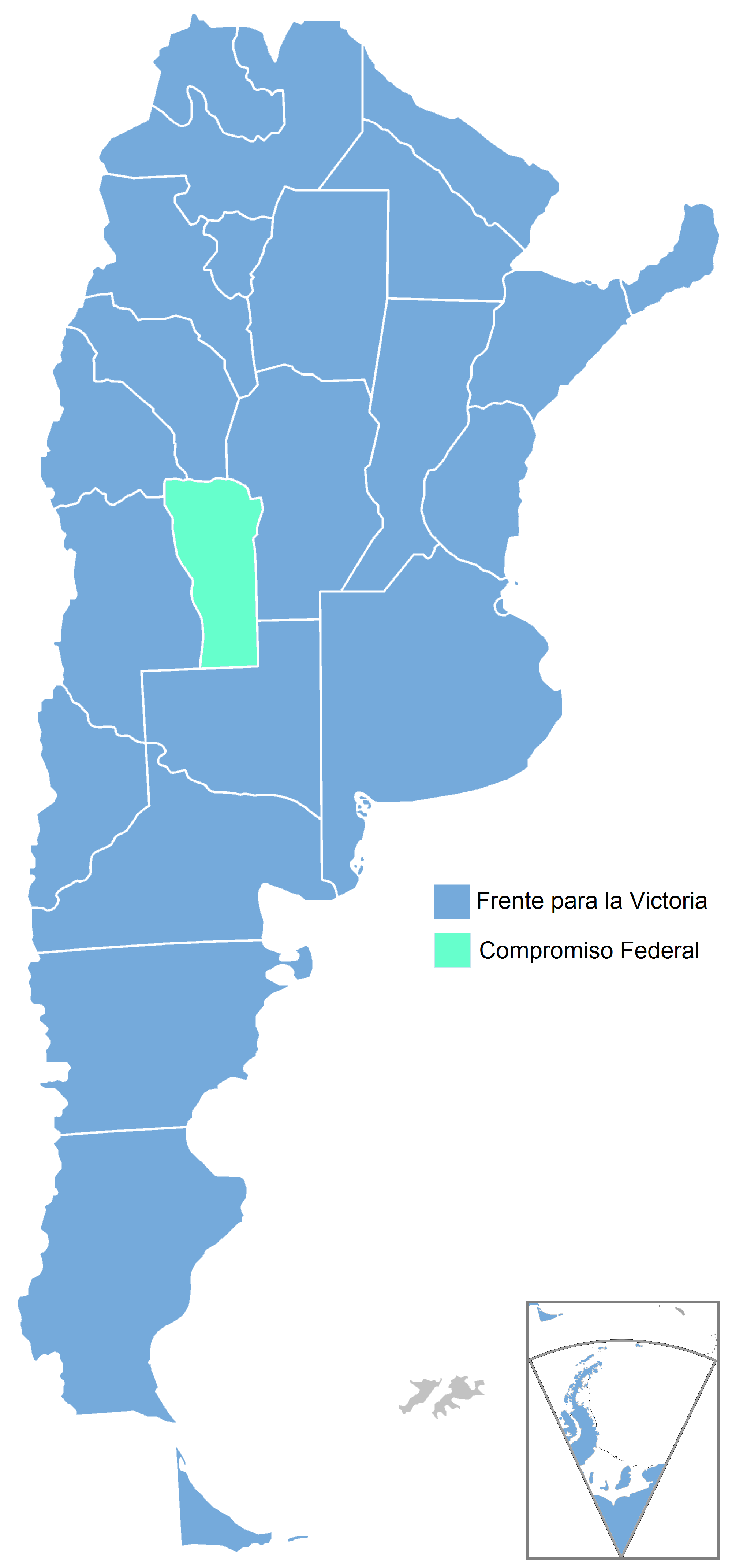 Mapa de las elecciones presidenciales de Argentina de 2011